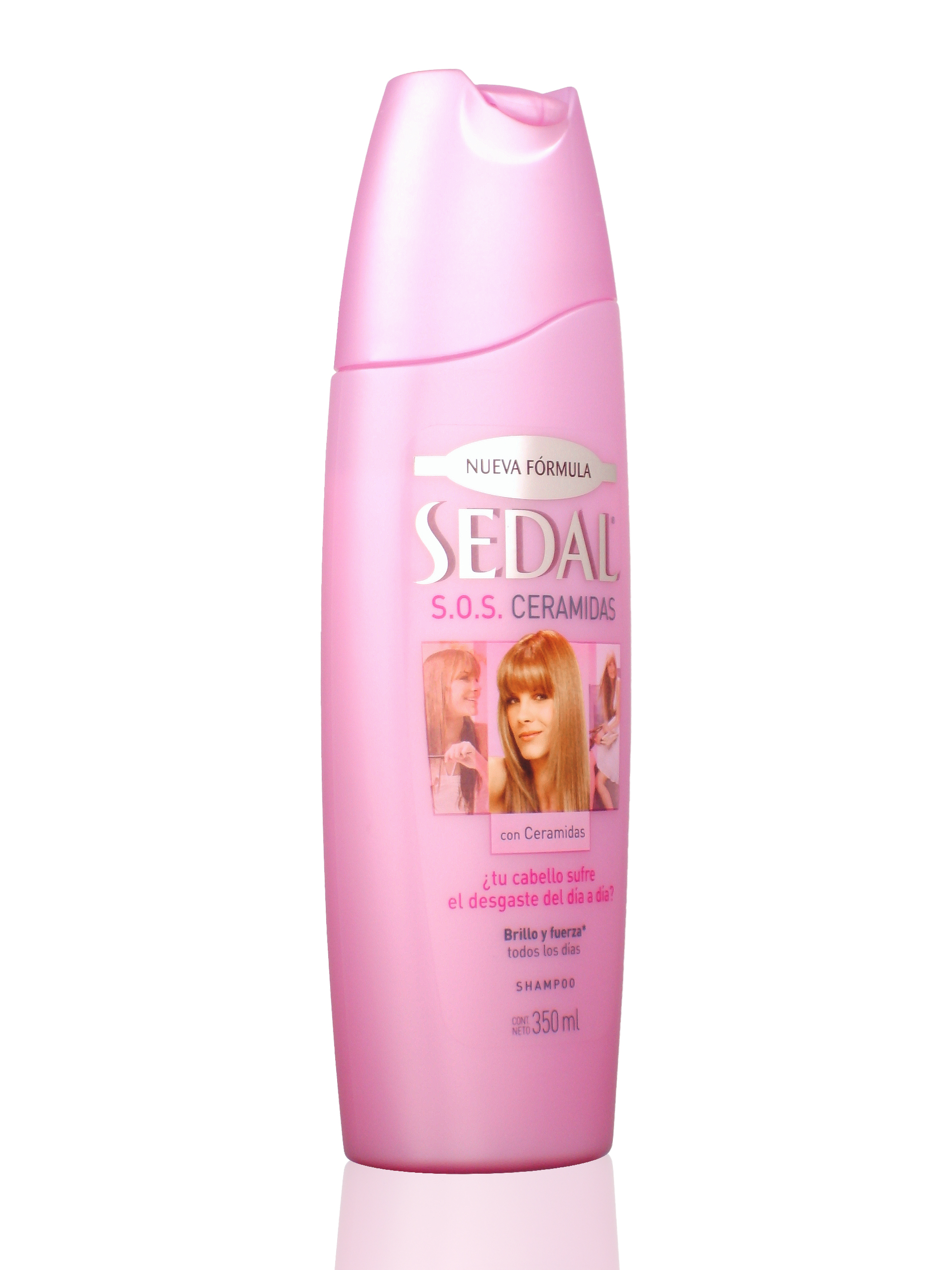 Botella de Champú Sedal, faricado por Unilever.